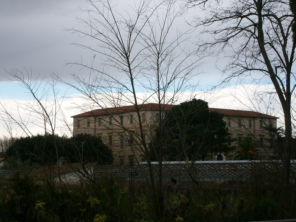 Istituto tecnico agrario "G. Pavoncelli" di Cerignola (FG)